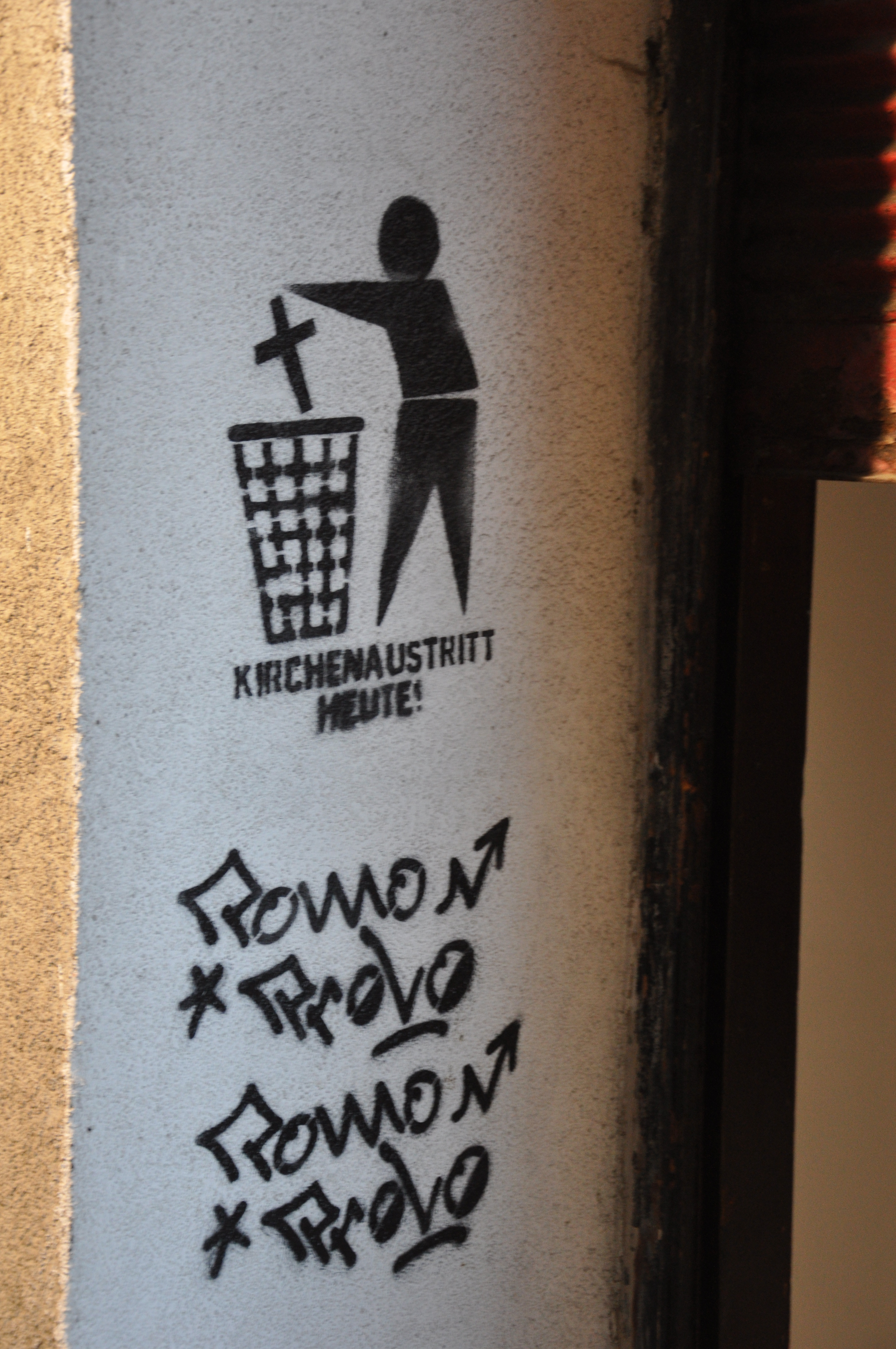 Wien, Archiv der sozialen Bewegungen und Kulturverein W23, Wipplingerstraße 23, Graffiti am Eingang (Aufforderung zum Kirchenaustritt)